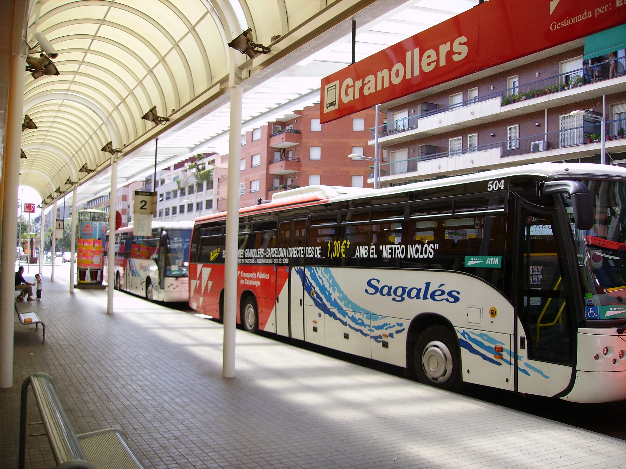 Estació d'Autobusos de Granollers, Vallès Oriental, Catalunya.